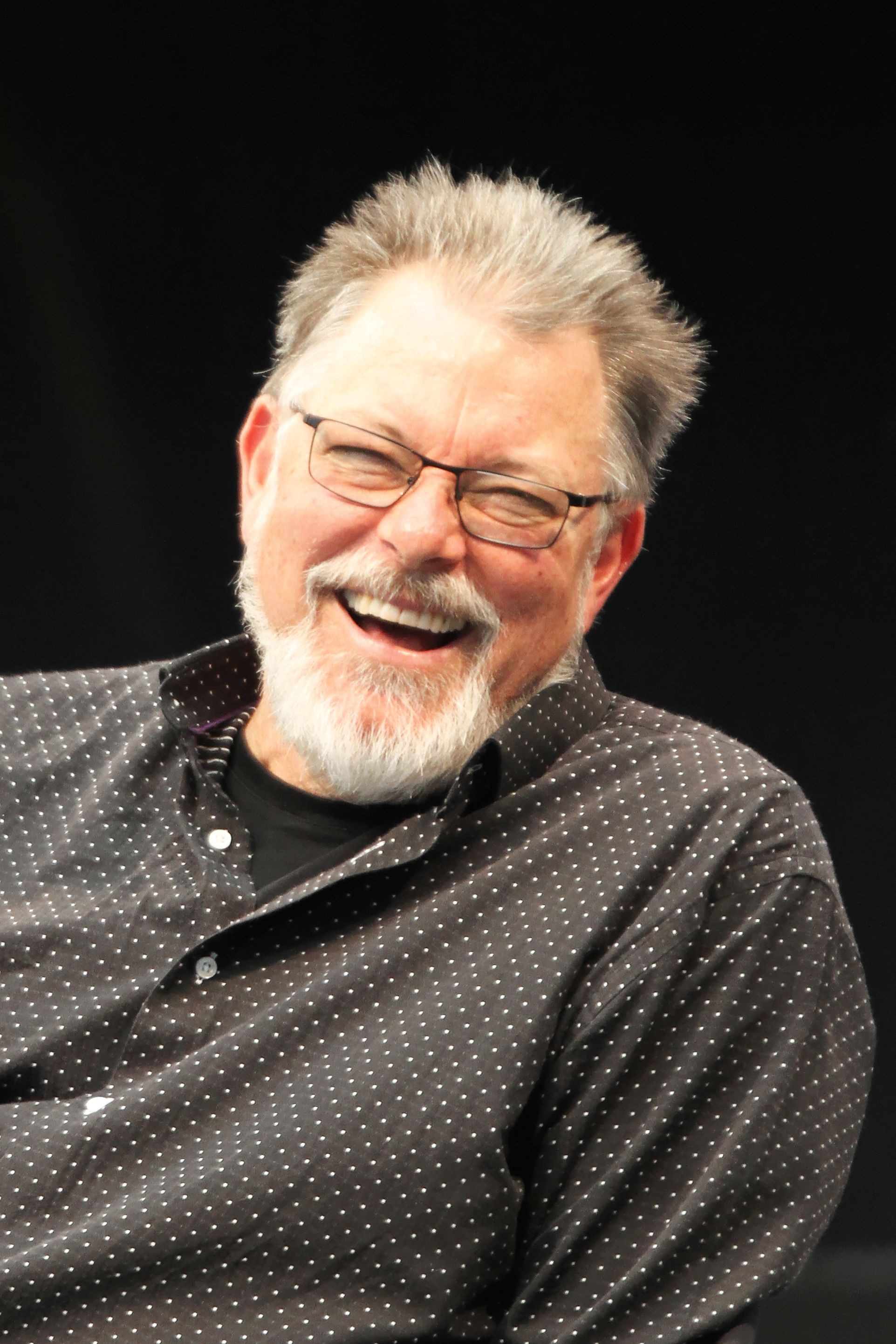 Bilder von der Comic Con Germany 2019 in Stuttgart